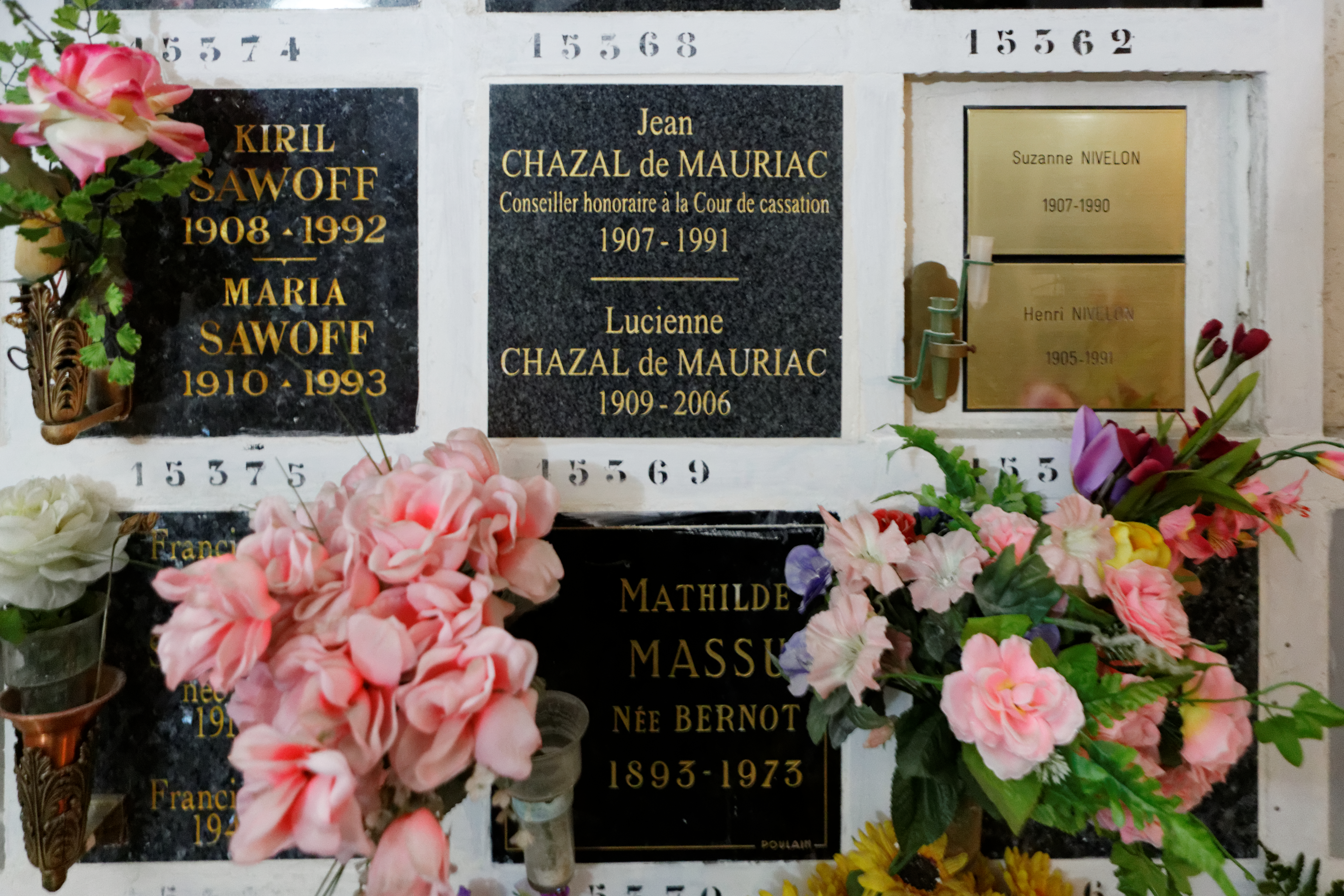 Sépulture de Jean Chazal (1907-1991), homme de justice français.